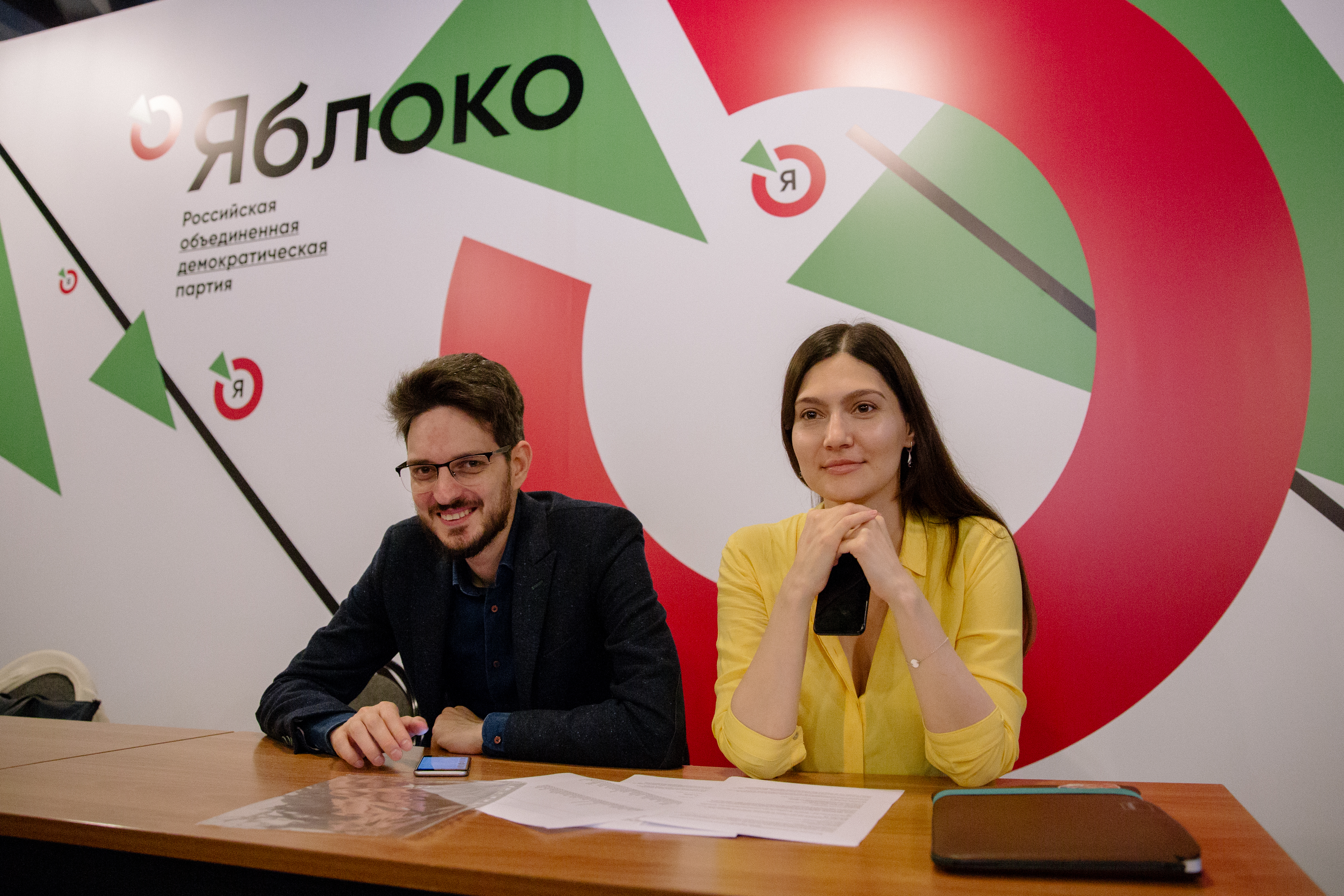 Максим Кац и Екатерина Патюлина